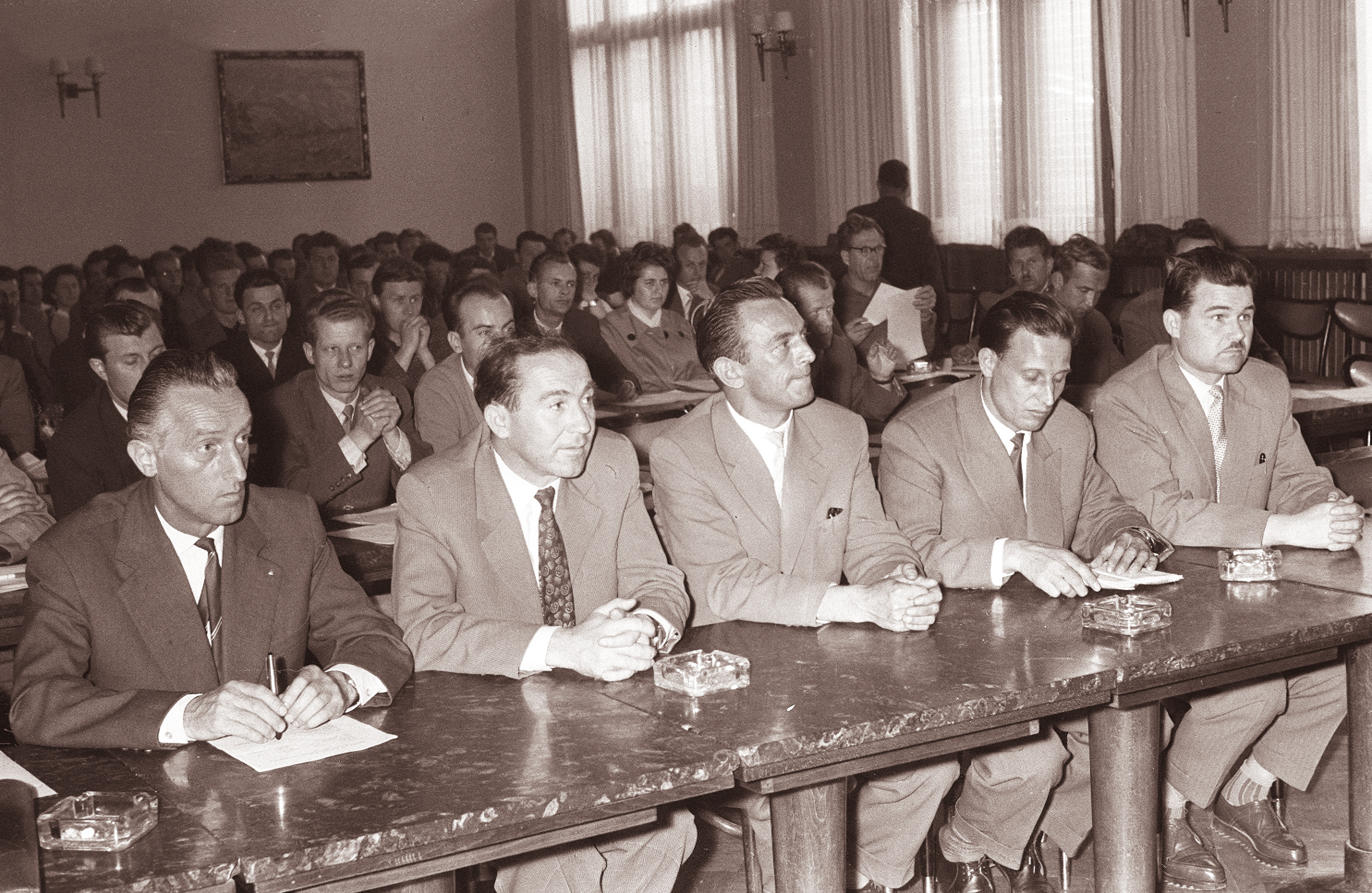 Občni zbor občinskega sindikalnega sveta Ravne na Koroškem. Na sliki z leve: direktor železarne Gregor Klančnik, Stane Kavčič, Ivo Janžekovič in Milan Ošlak.